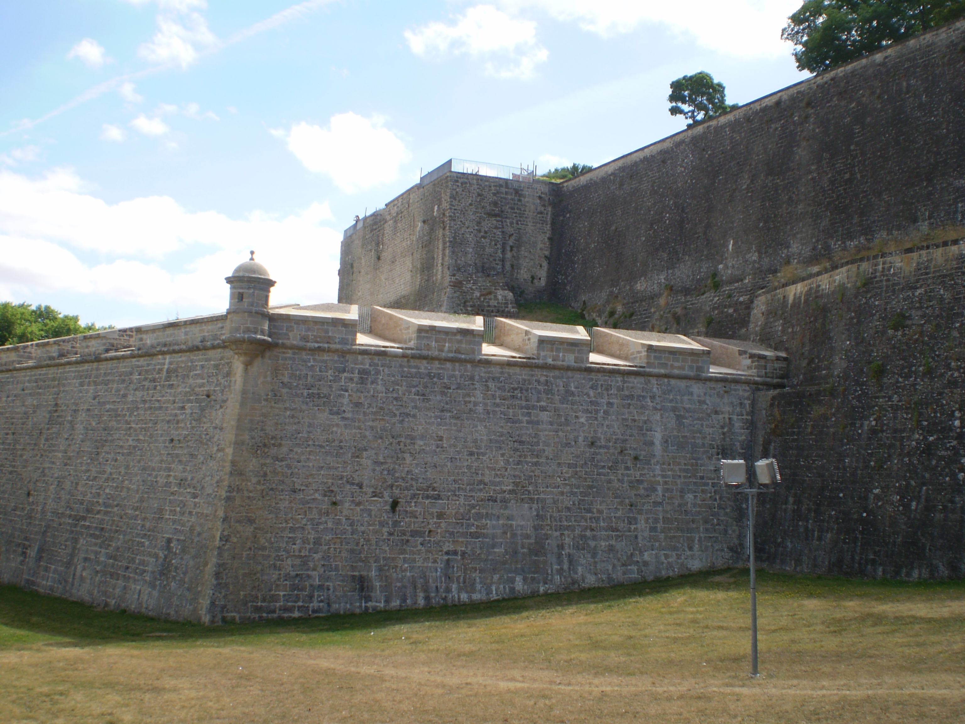 Baluarte del Redín en las Murallas de Pamplona (Navarra-España)